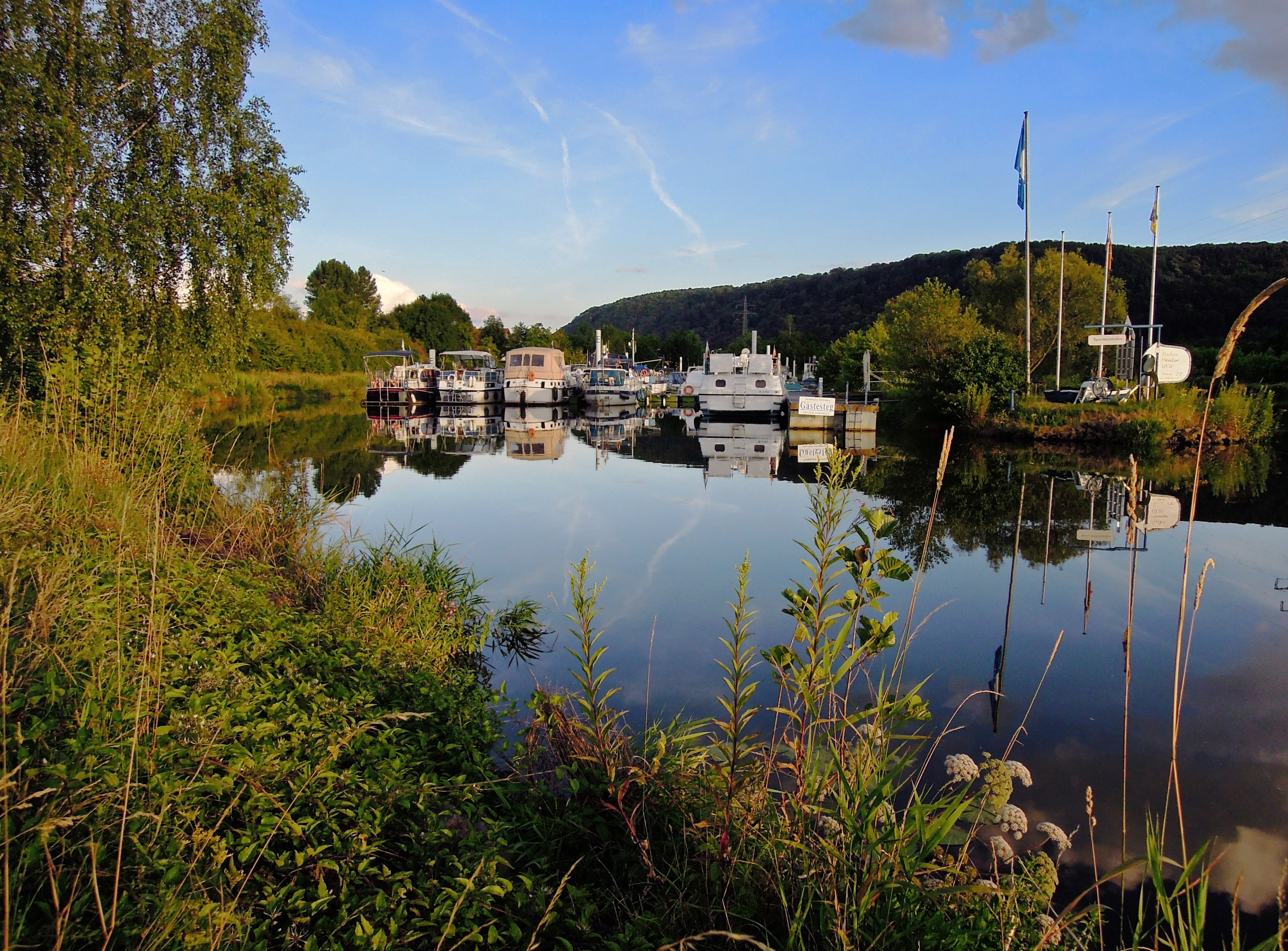 Sporthafen